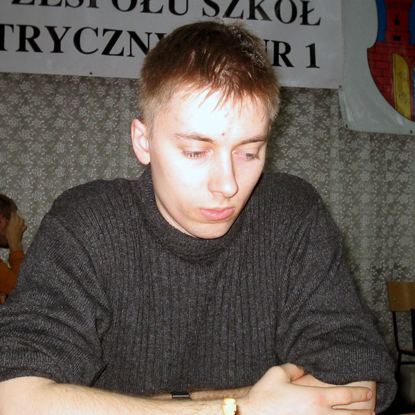 Marcin Szeląg, Cracow 2006